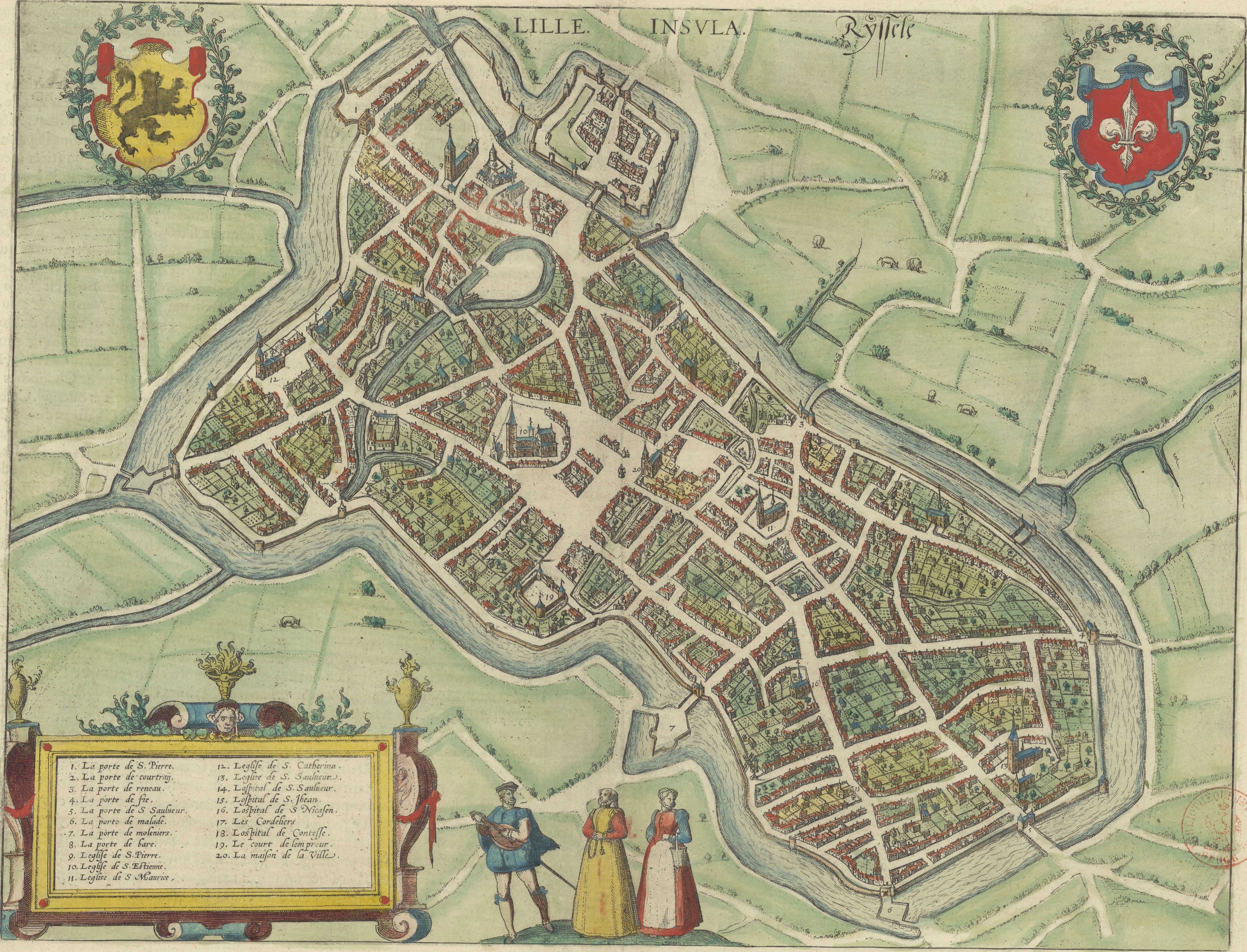 Plan de Lille édité en 1645